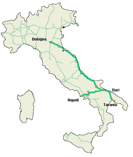 Le autostrade pugliesi, creato da me partendo da immagini già esistenti su wiki